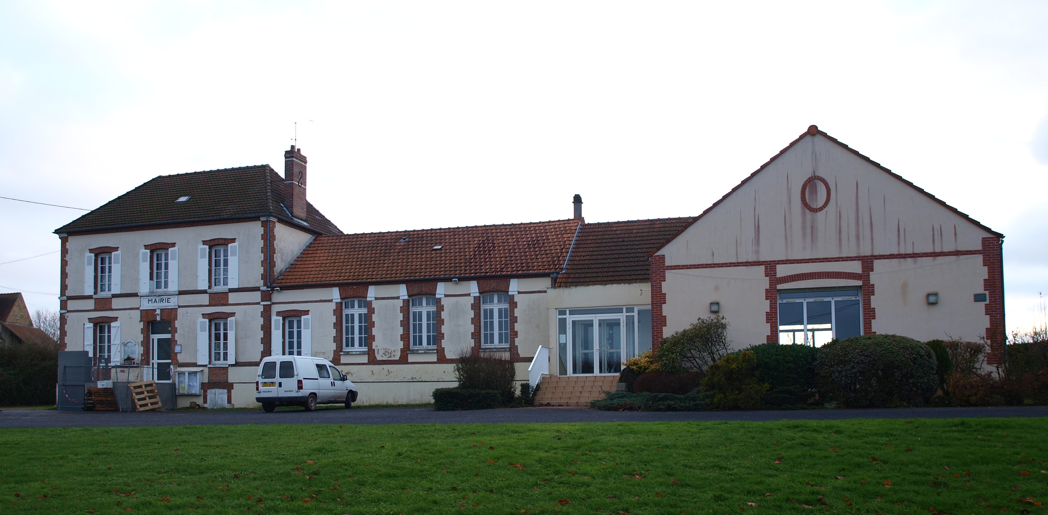 Morsains (Marne, France) ; mairie.